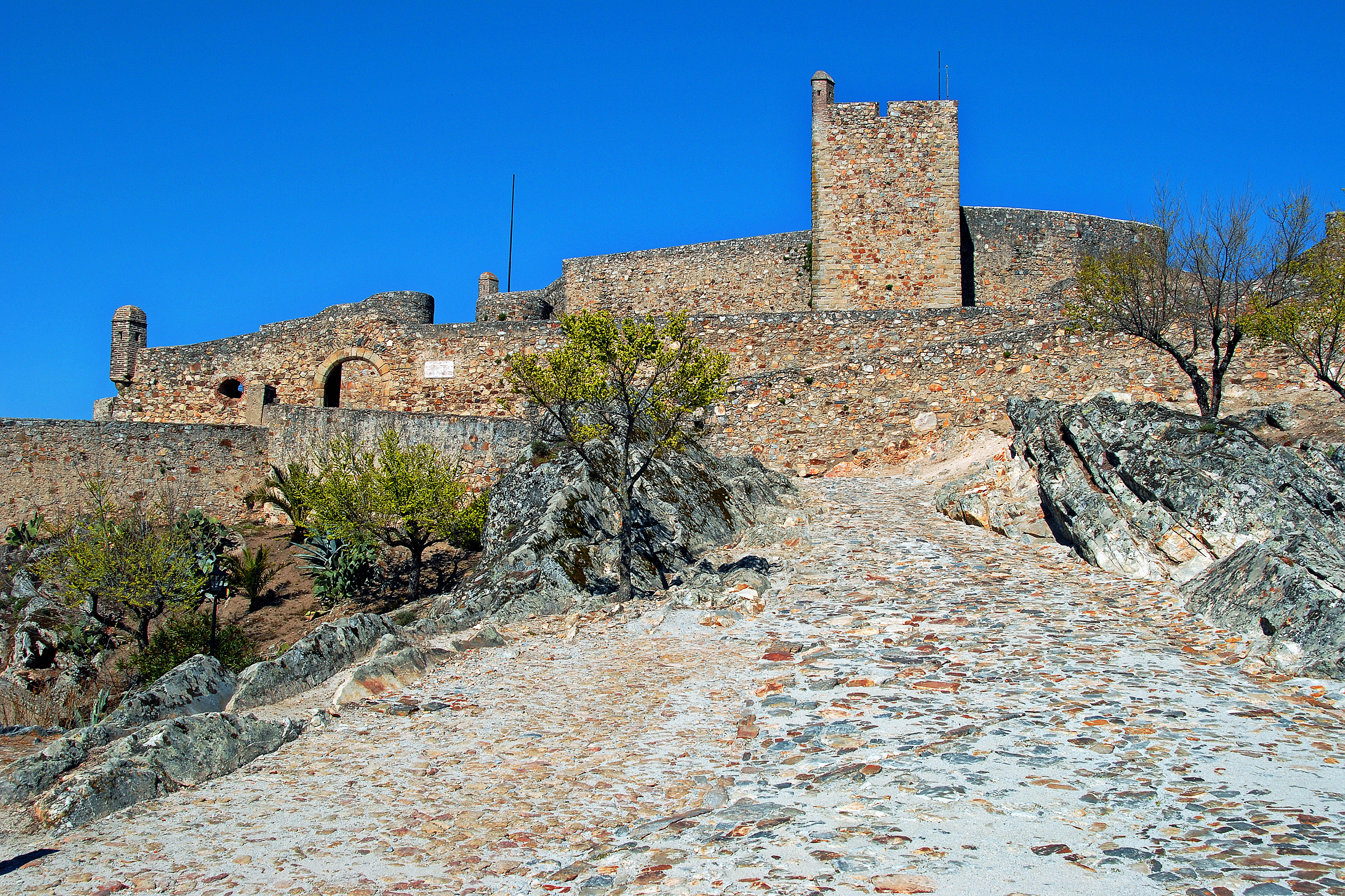 Castelo de Marvão This file was uploaded for Wiki Loves Monuments in Portugal with the unique identifier 70363.